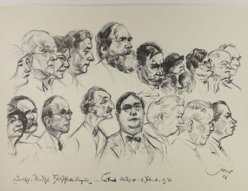 Teilnehmer der Nordisch-Deutsche Schriftstellertagung 1931 in Lübeck. Veranstaltung der Nordischen Gesellschaft gemeinsam mit dem PEN-Club. Zeichnung von Emil Stumpp.